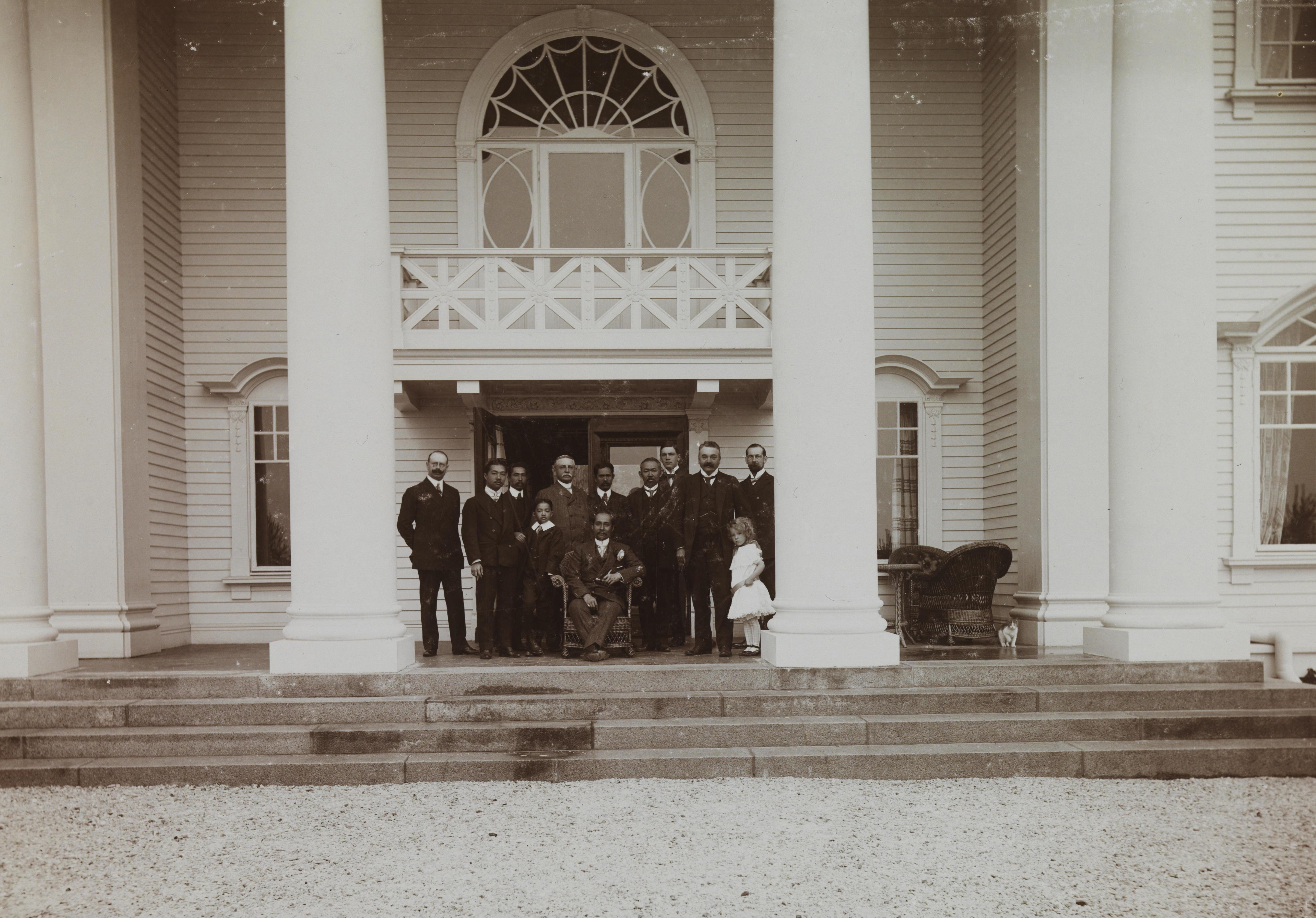 Bildet er hentet fra Nasjonalbibliotekets bildesamling Notodden, Telemark Depicted person: Eyde, Sam Depicted person: Chulalongkorn kong Depicted person: Eyde, Liv